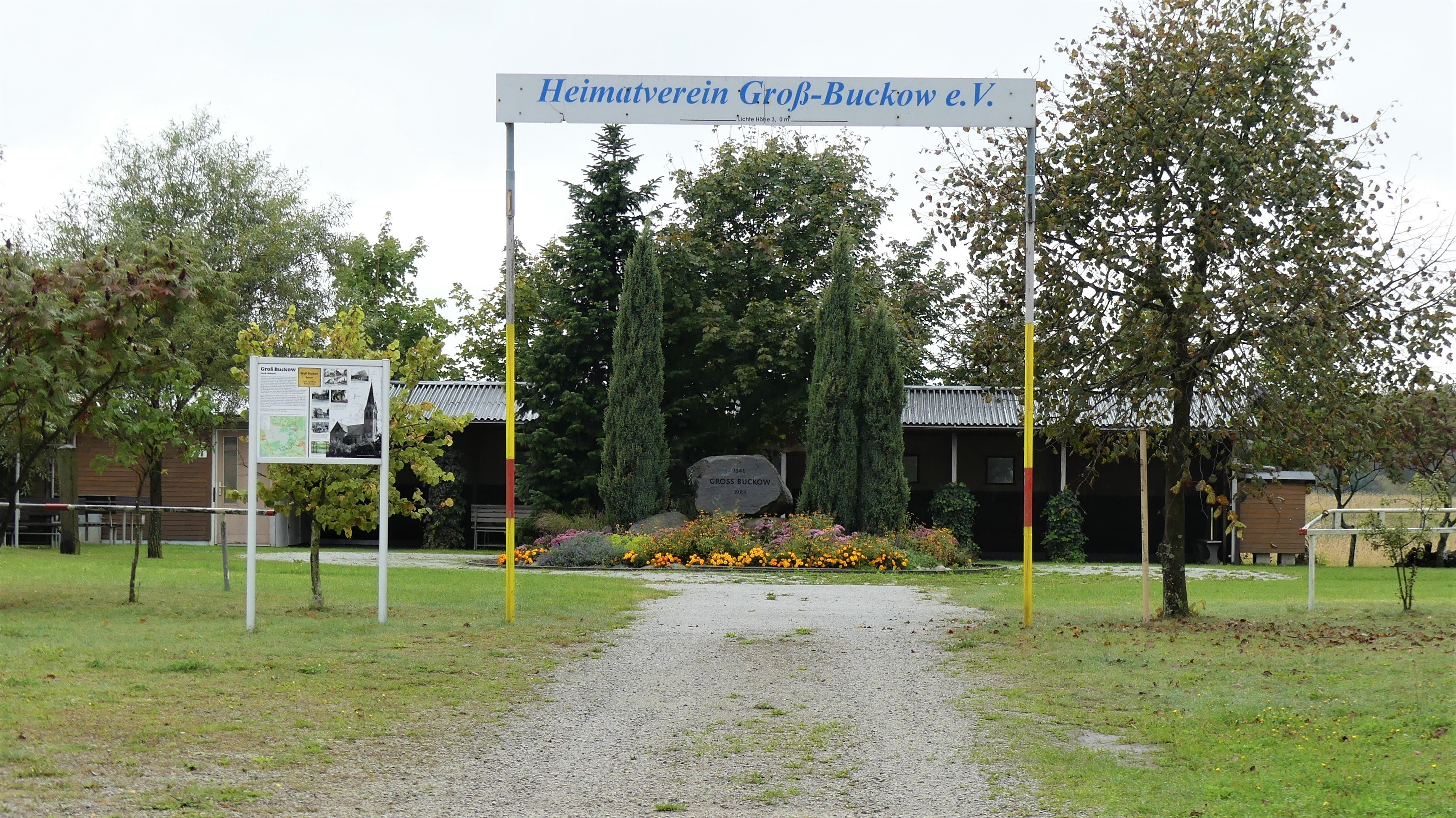 Gedenkstätte für das abgebaggerte Dorf Groß Buckow durch den Tagebau Welzow-Süd.